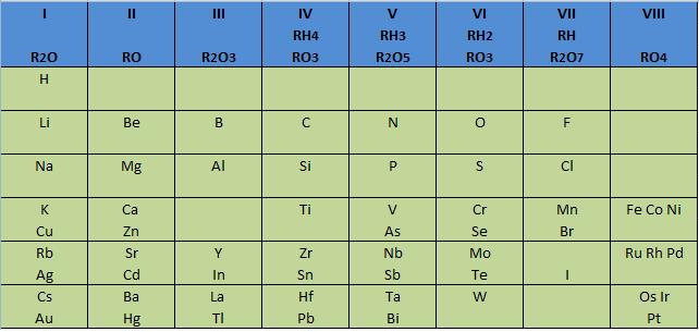 Tabla Periódica Mendeleiev 1872